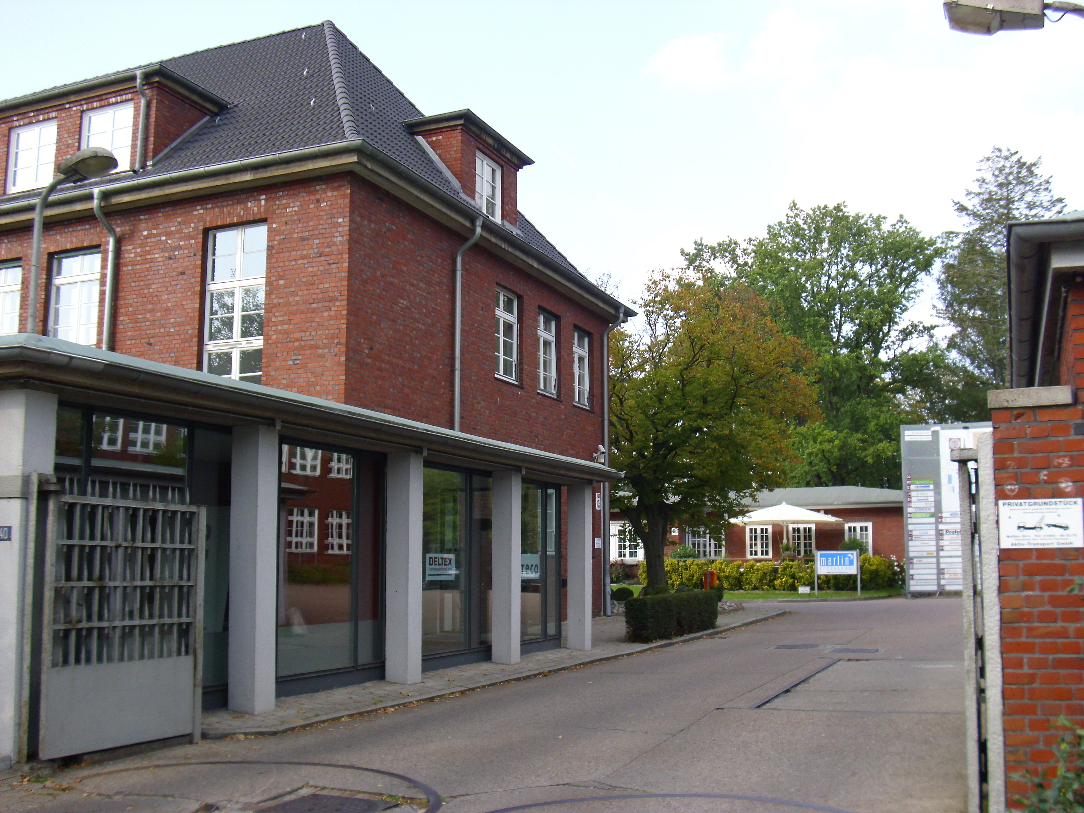 Einfahrt Tarpen 40, des ehemaligen Rüstungsbetriebes „Deutsche Messapparatebau GmbH“ This is a photograph of an architectural monument.